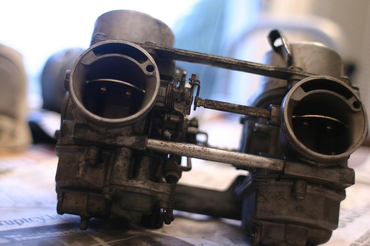 Carburatore a depressione, vista lato aspirazione